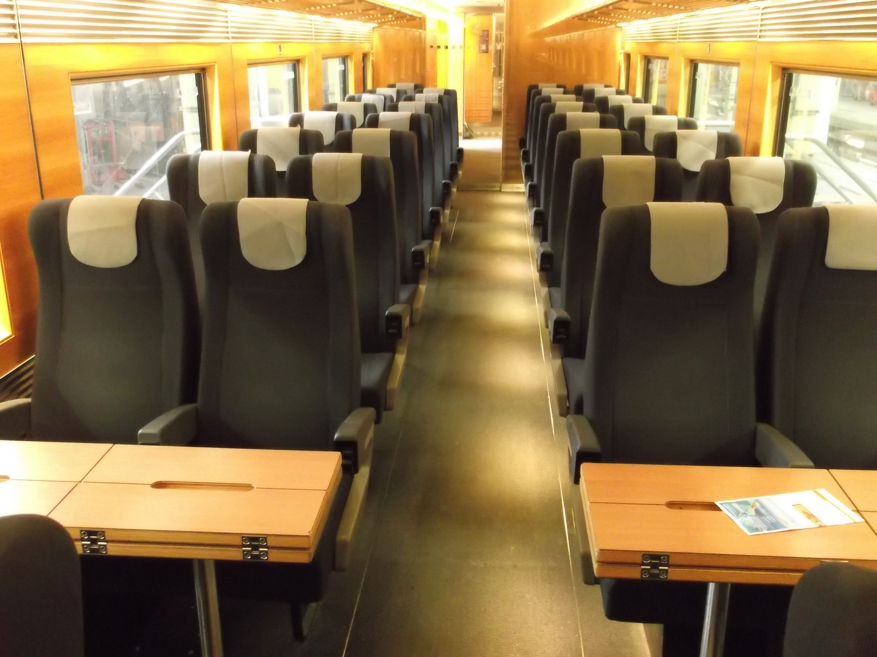 Traveller Sitzanordnung - Wagen 1 - im Metropolitan Zug der Deutschen Bahn - Fernverkehr